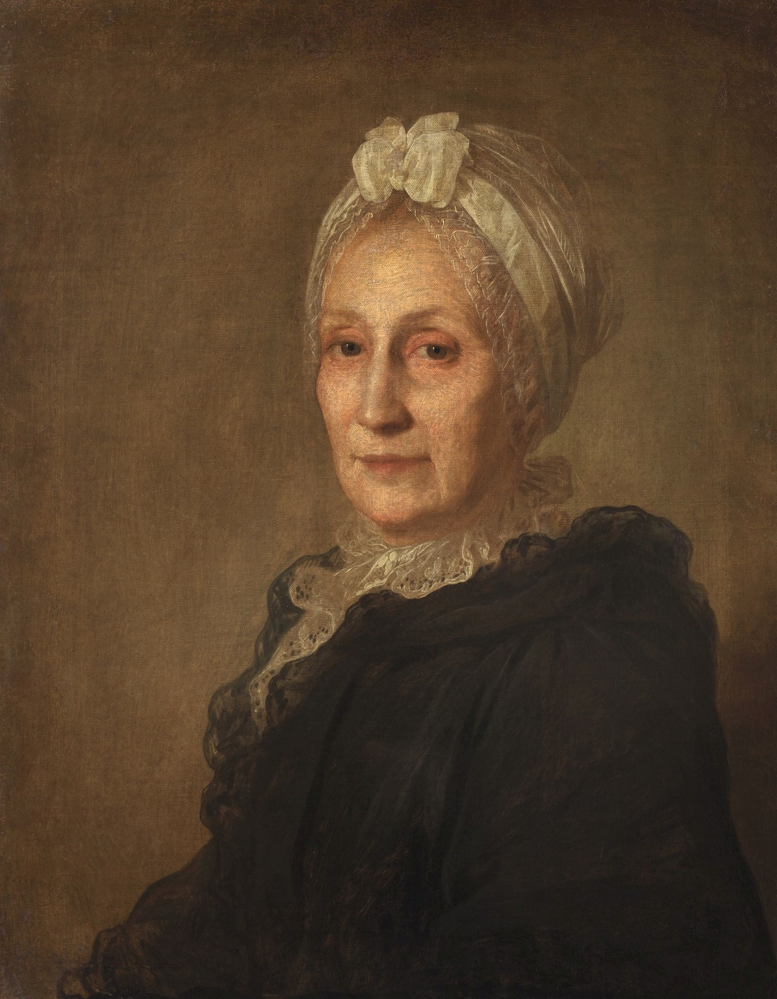 Анна Юрьевна Квашнина-Самарина (около 1720–1781), урождённая Ржевская. Жена президента Главного Магистрата Ф. П. Квашнина-Самарина. Квашнина-Самарина приходилась родной сестрой С.Ю. Пушкиной, прабабушке поэта по линии матери. Ее отцом был Ю.А. Ржевский, любимец Петра I, нижегородский вице-губернатор, действительный статский советник.